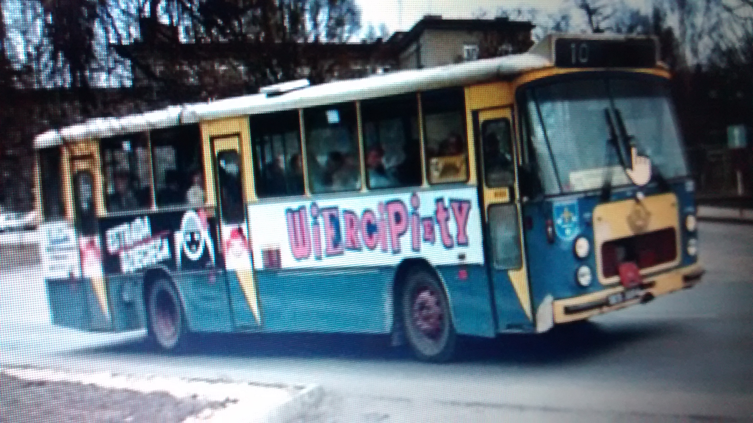 Autobus lini 10 (1990 r.)